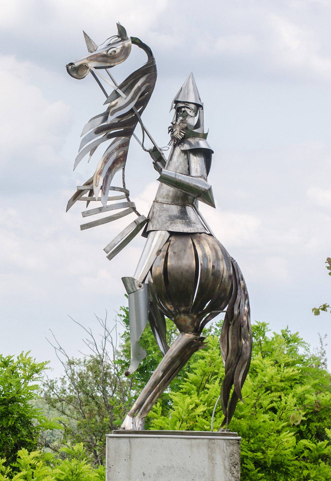 "L'épopée chimérique", de Jane Conil, 2007, sculpture contemporaine équestre représentant Geoffroy la Grand Dent à Lusignan, promenade de Blossac